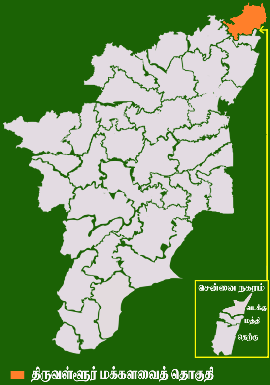 தமிழக வரைபடத்தில் உள்ள திருவள்ளூர் மக்களவைத் தொகுதி